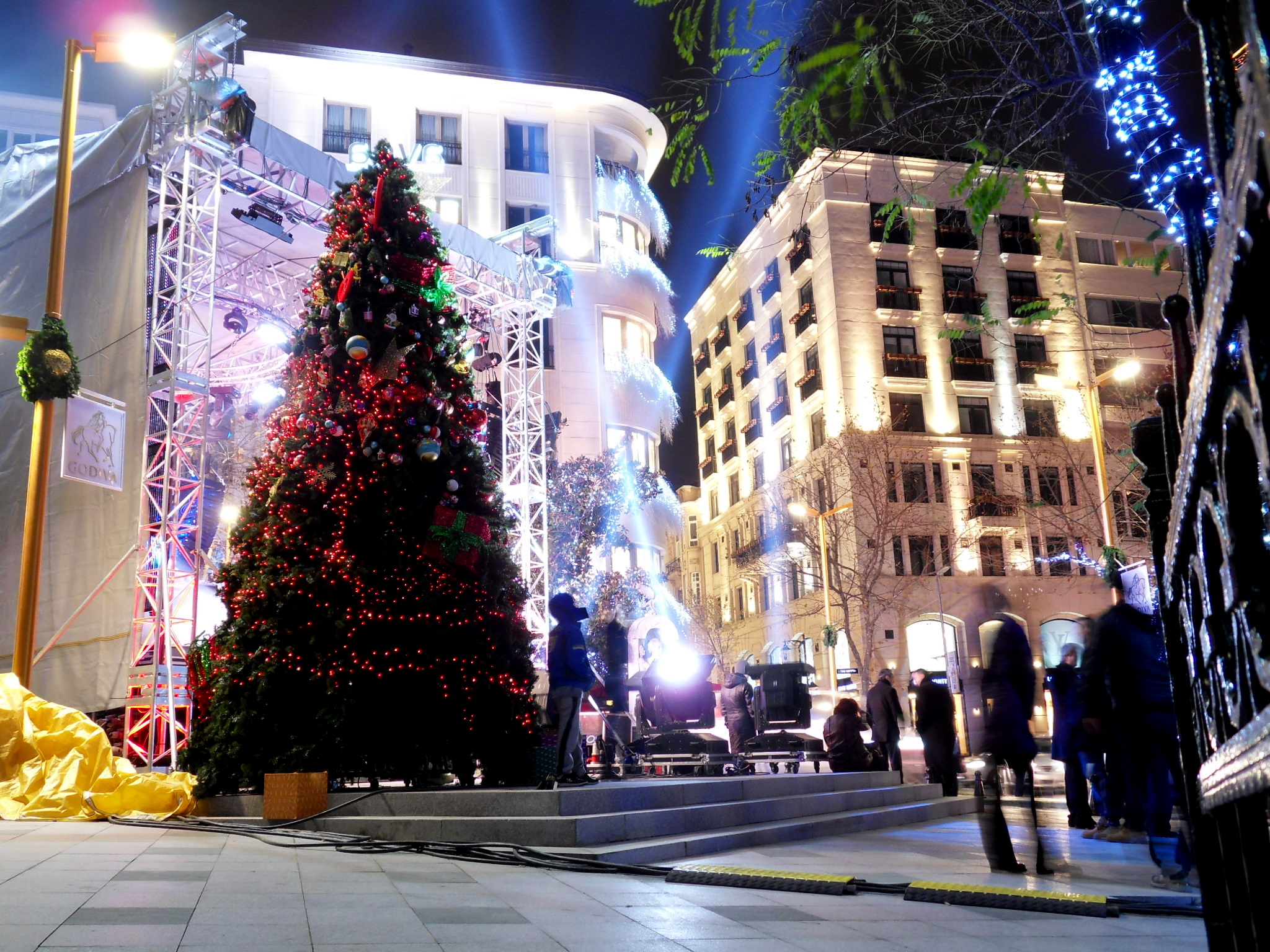 Nişantaşı 2010-11 Yılbaşı Süslemeleri